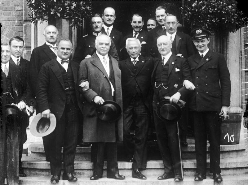 Prof. Dr. Junkers, Ehrenbürger der Stadt Aachen! Prof. Dr. Junkers (Mitte) nach seiner Ernennung zum Ehrenbürger der Stadt Aachen auf der Freitreppe des Rathauses. Ganz links im Bilde, der berühmte Bremenflieger Hauptmann Köhl, rechts von Hünefeld, sowie Senatoren der Stadt Aachen.